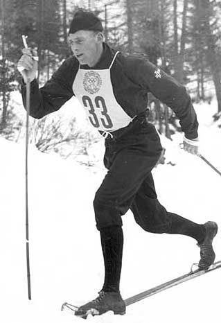 SVERRE STENERSEN: Vant kombinertkonkurransen i Cortina i 1956.